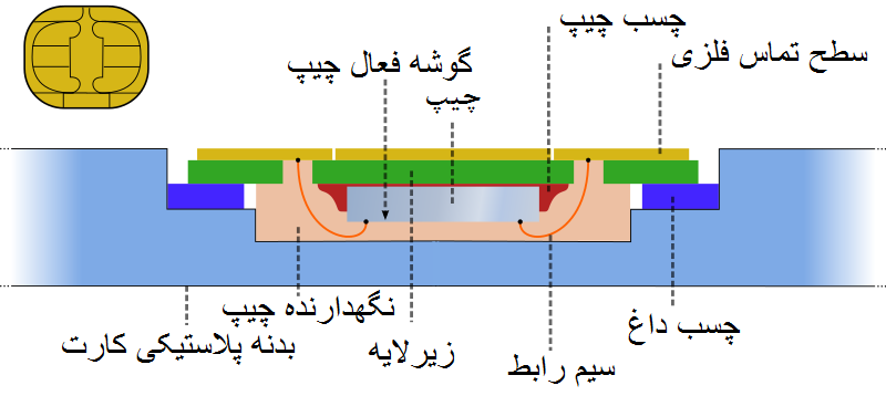 برش اجزاء کارت هوشمند